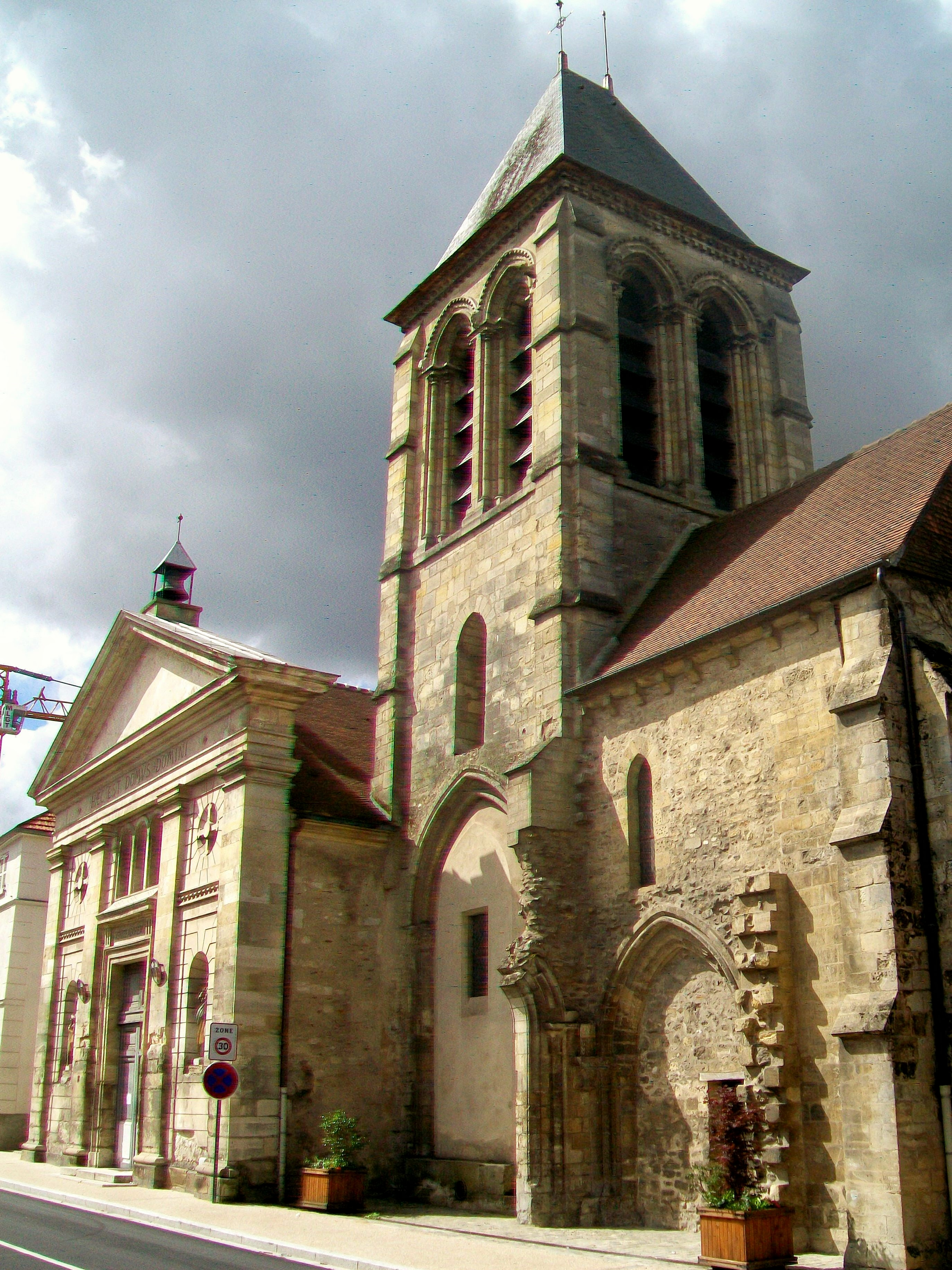 Clocher et transept nord, derniers vestiges de l'église du XIIIe siècle.